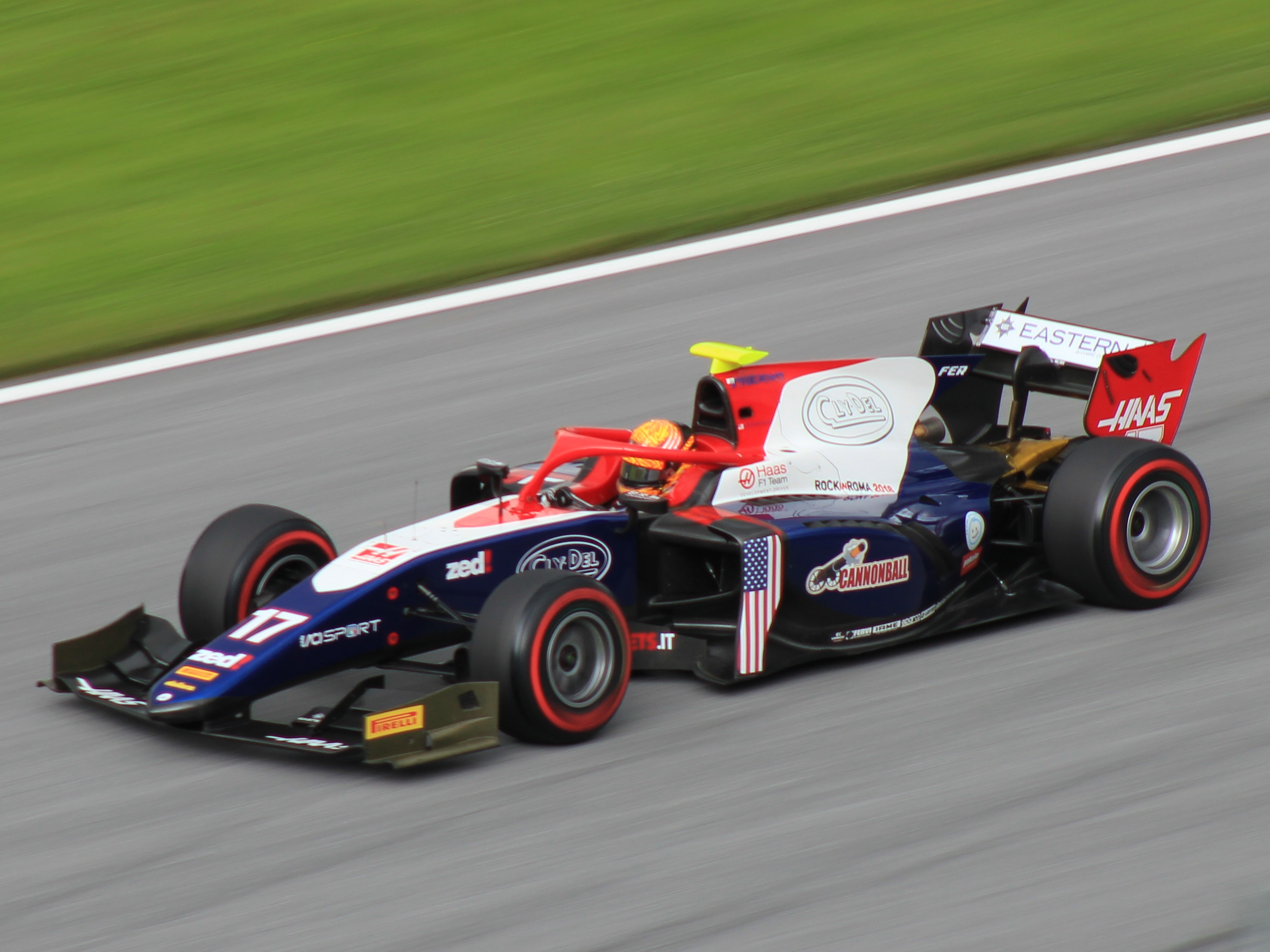 17 Santino Ferrucci beim Rennwochenende in Österreich 2018